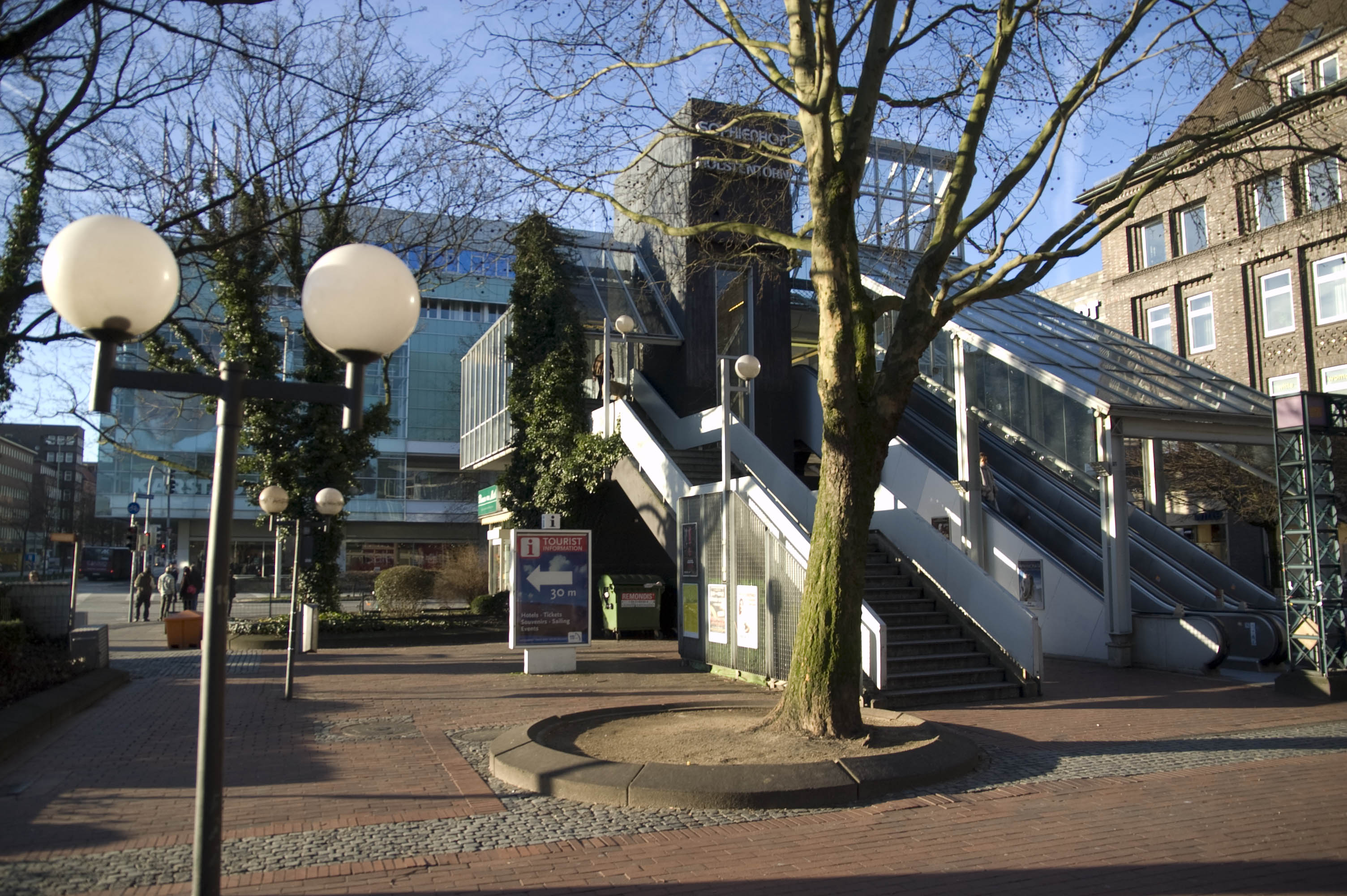 Holstenstraße Kiel